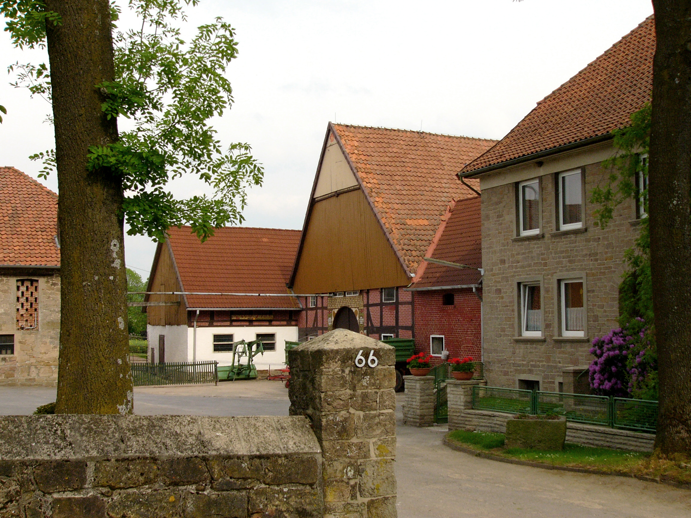 Hof in Mossenberg-Wöhren, Ortsteil von Blomberg, Germany